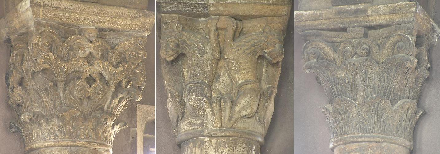 Capitelli della Sala dei Torresani, all'ultimo piano visitabile della Ghirlandina.